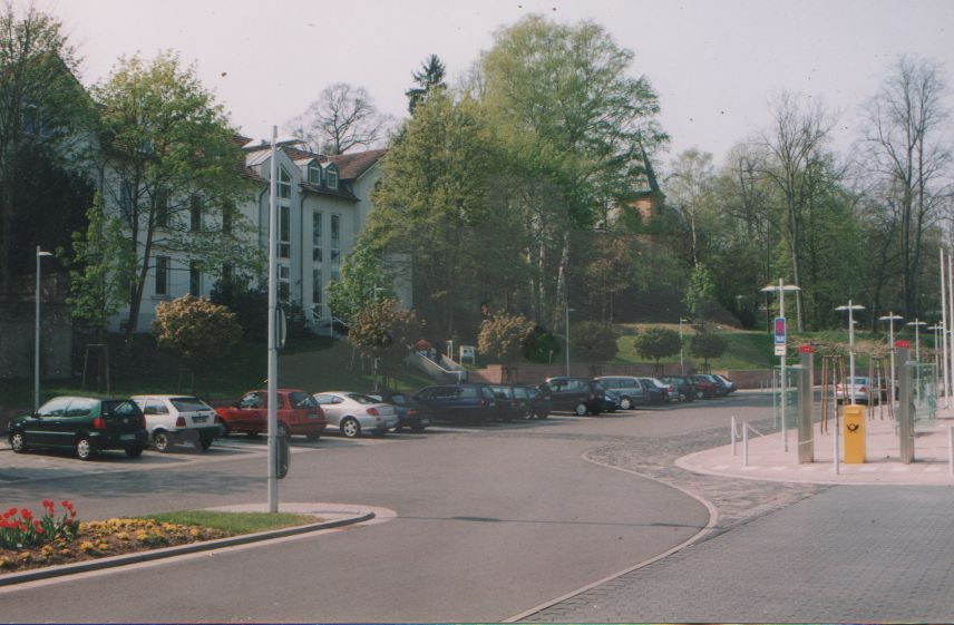 Gebäude der SAP in St. Ingbert/Saar ggü. Bf. St. Ingbert Foto: mäfä 30. Mai 2002